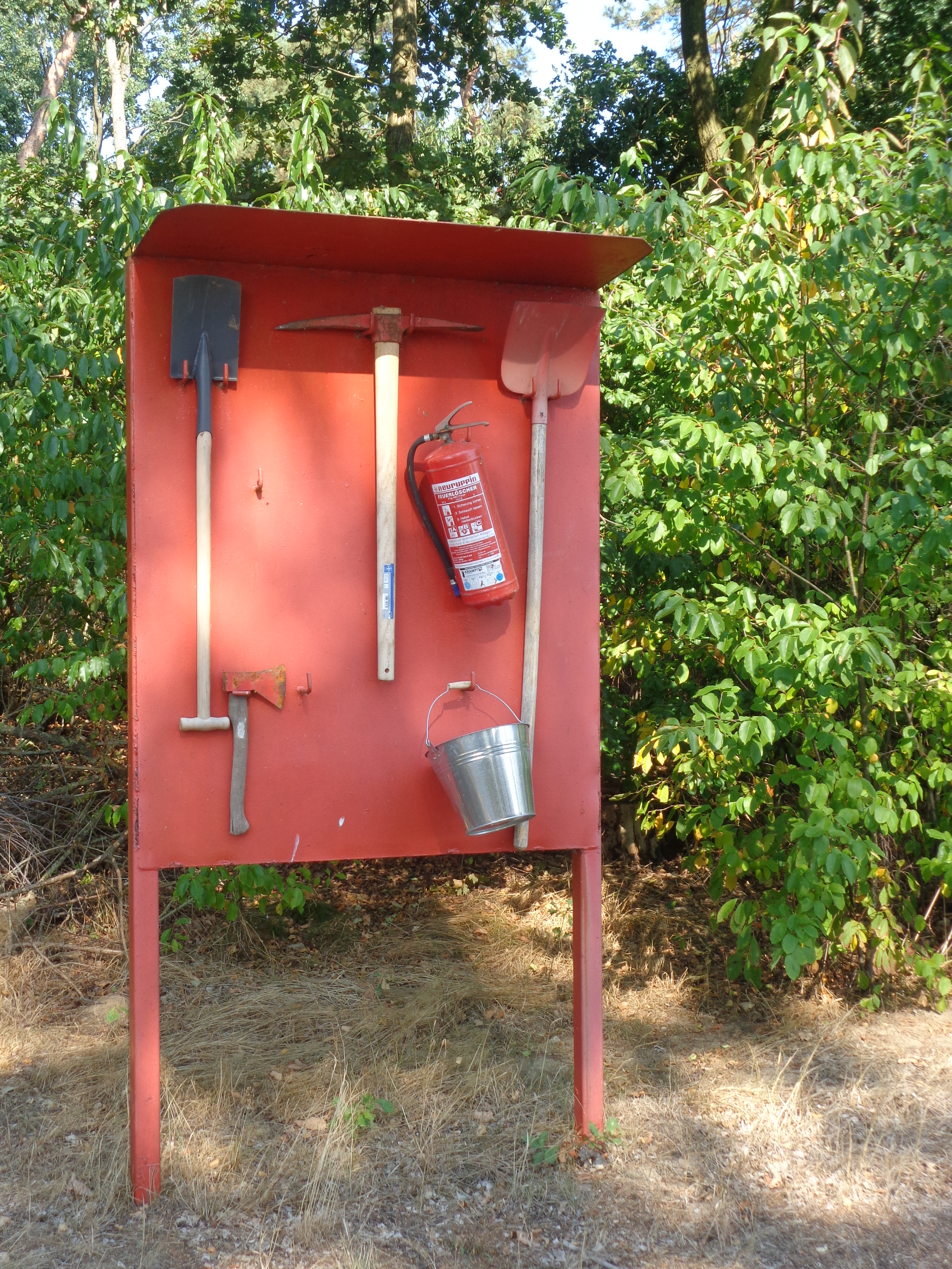 Altbewährte Brandbekämpfungsmittel auf einem Campinplatz in Mecklenburg.